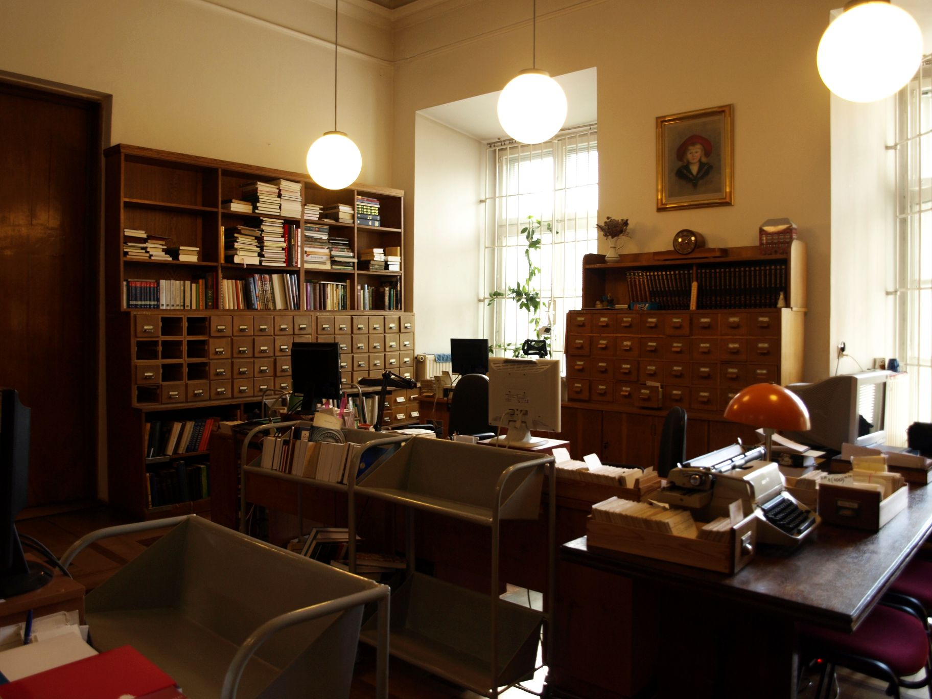 zespół zamkowy, obecnie Muzeum PAN, biblioteka Kórnik, Kórnik